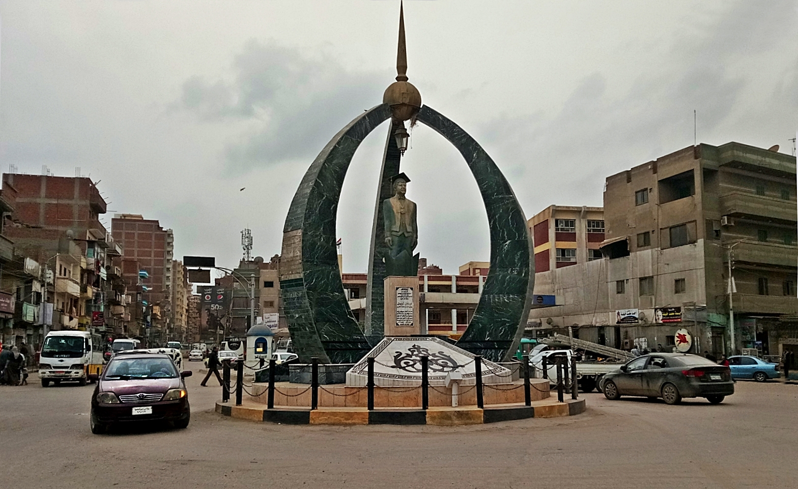 ميدان أحمد زويل أحد ميادين مدينة دسوق.